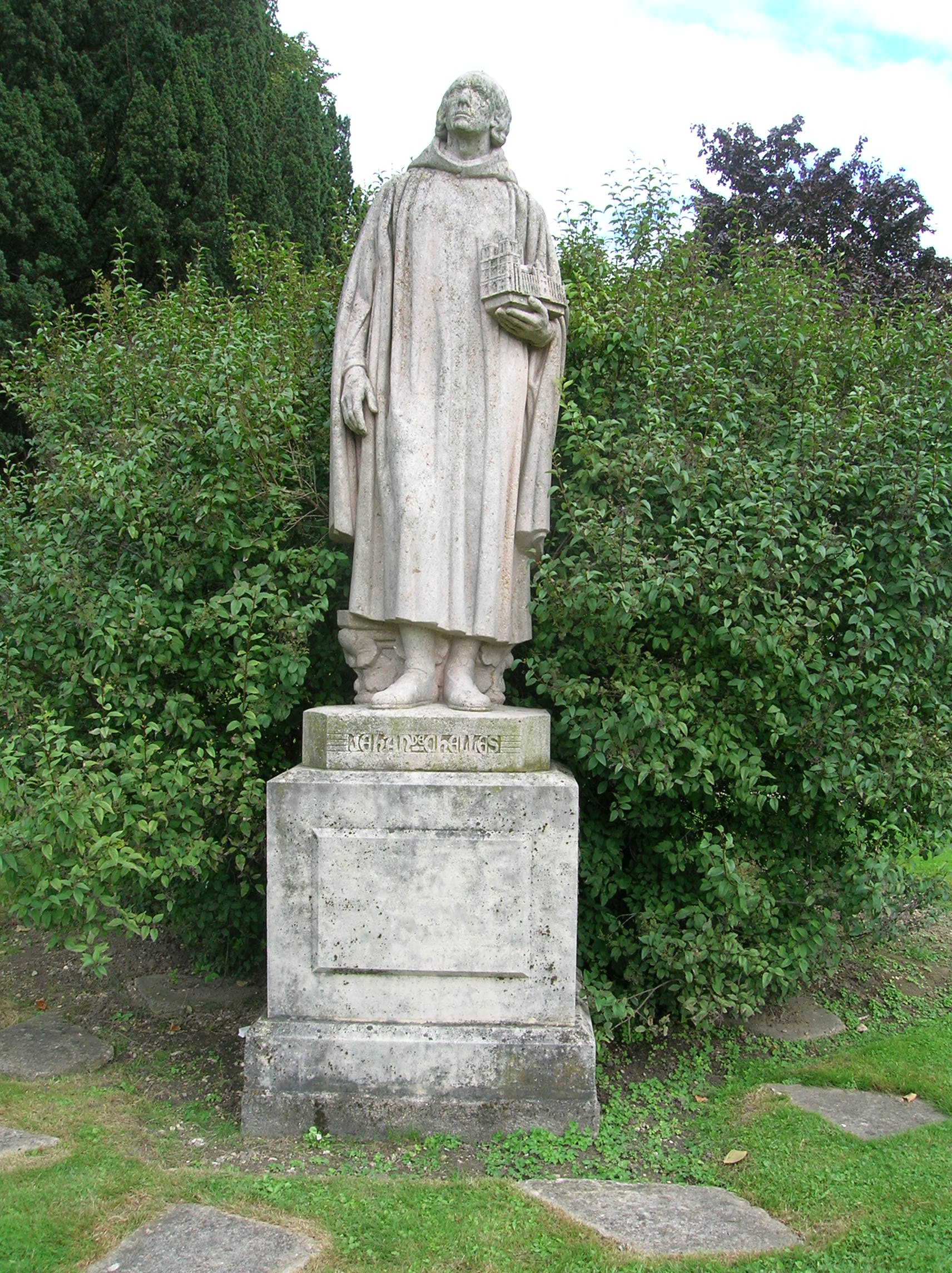 Chelles (Seine et Marne, France): statue of Jehan de Chelles